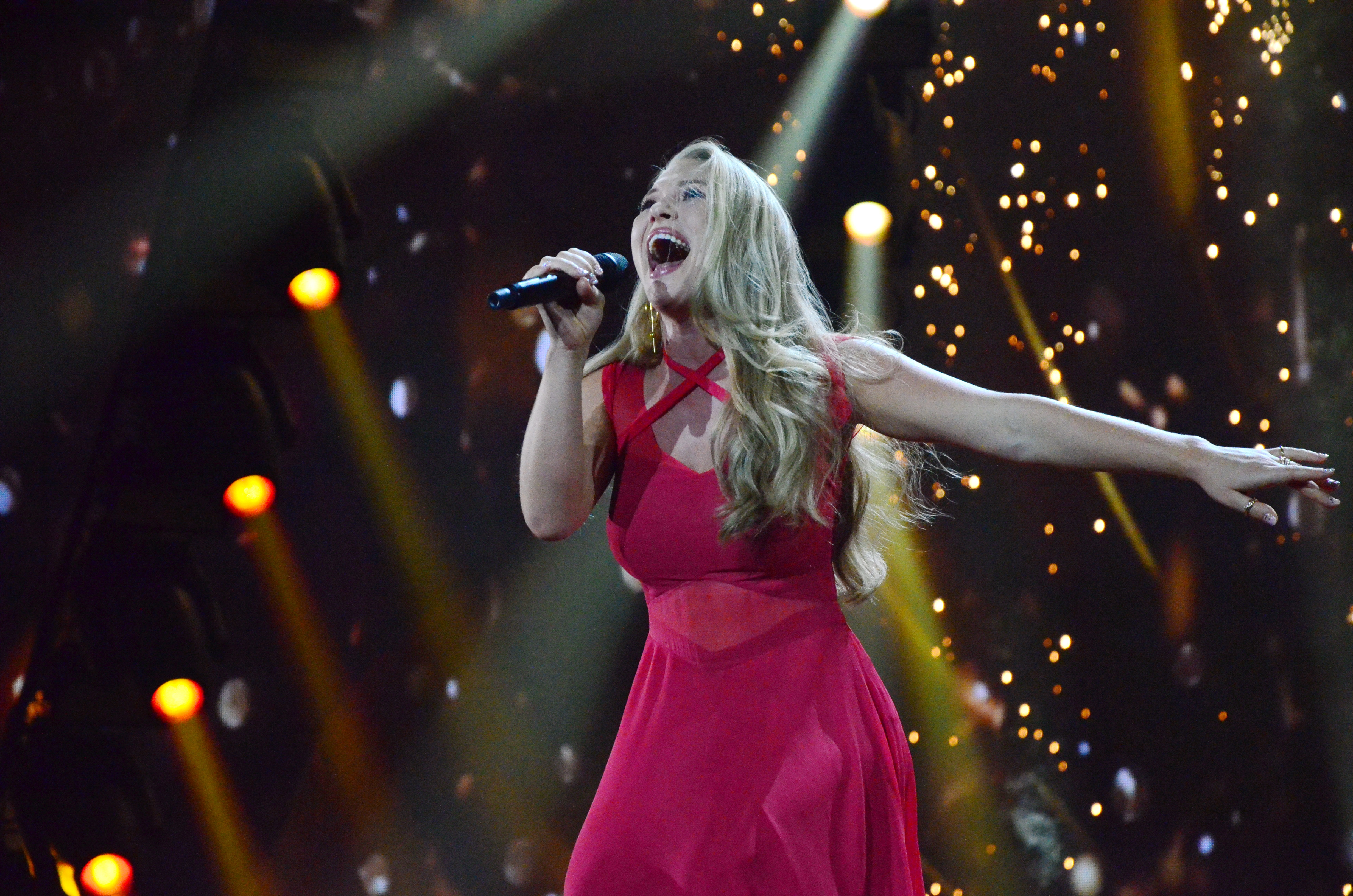 12 травня. Генеральна репетиція фіналу Євробачення 2017. Anja (Denmark).